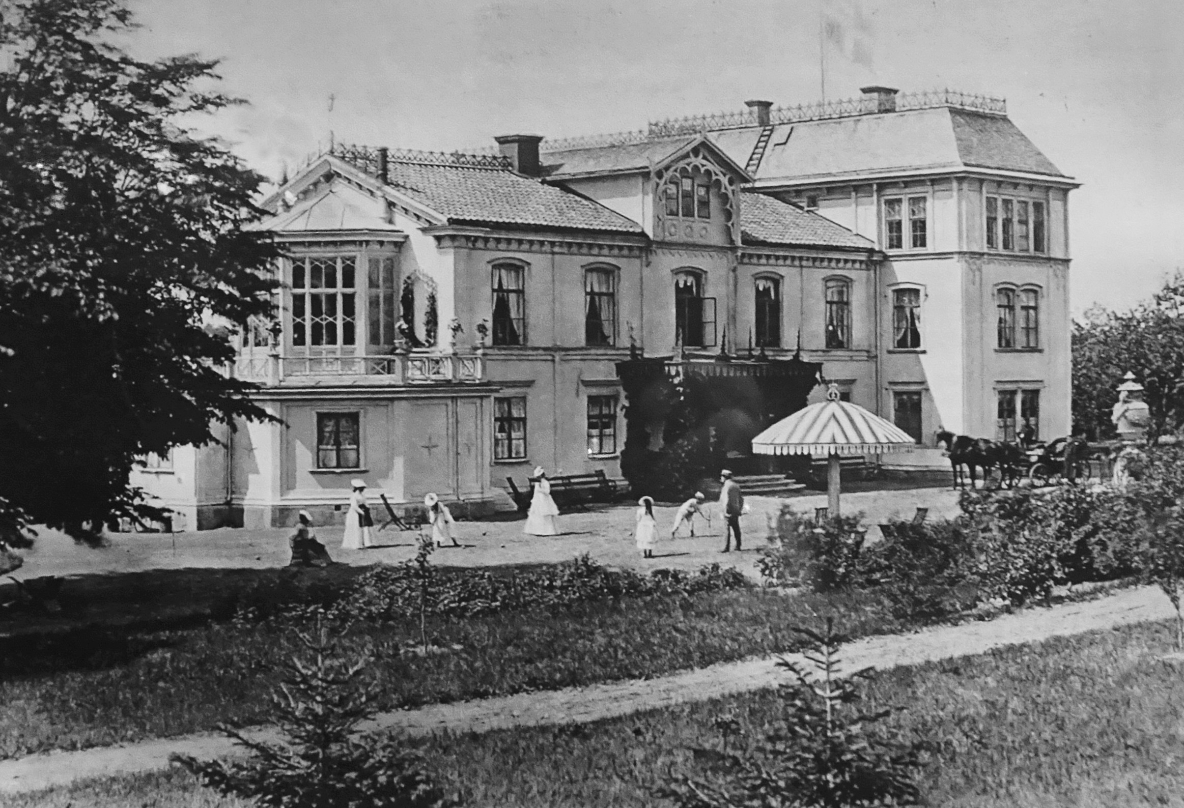 Lövsta gård, Enhörna